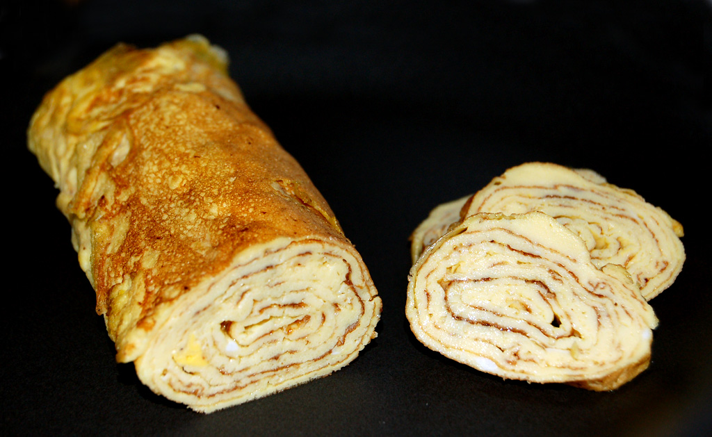 Tamago, japanisches Omelett